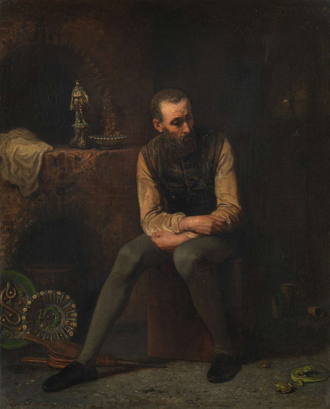 schilderij; Palissy, Bernard; Palissy, Bernard; portret; mansportret; Palissy, Bernard de